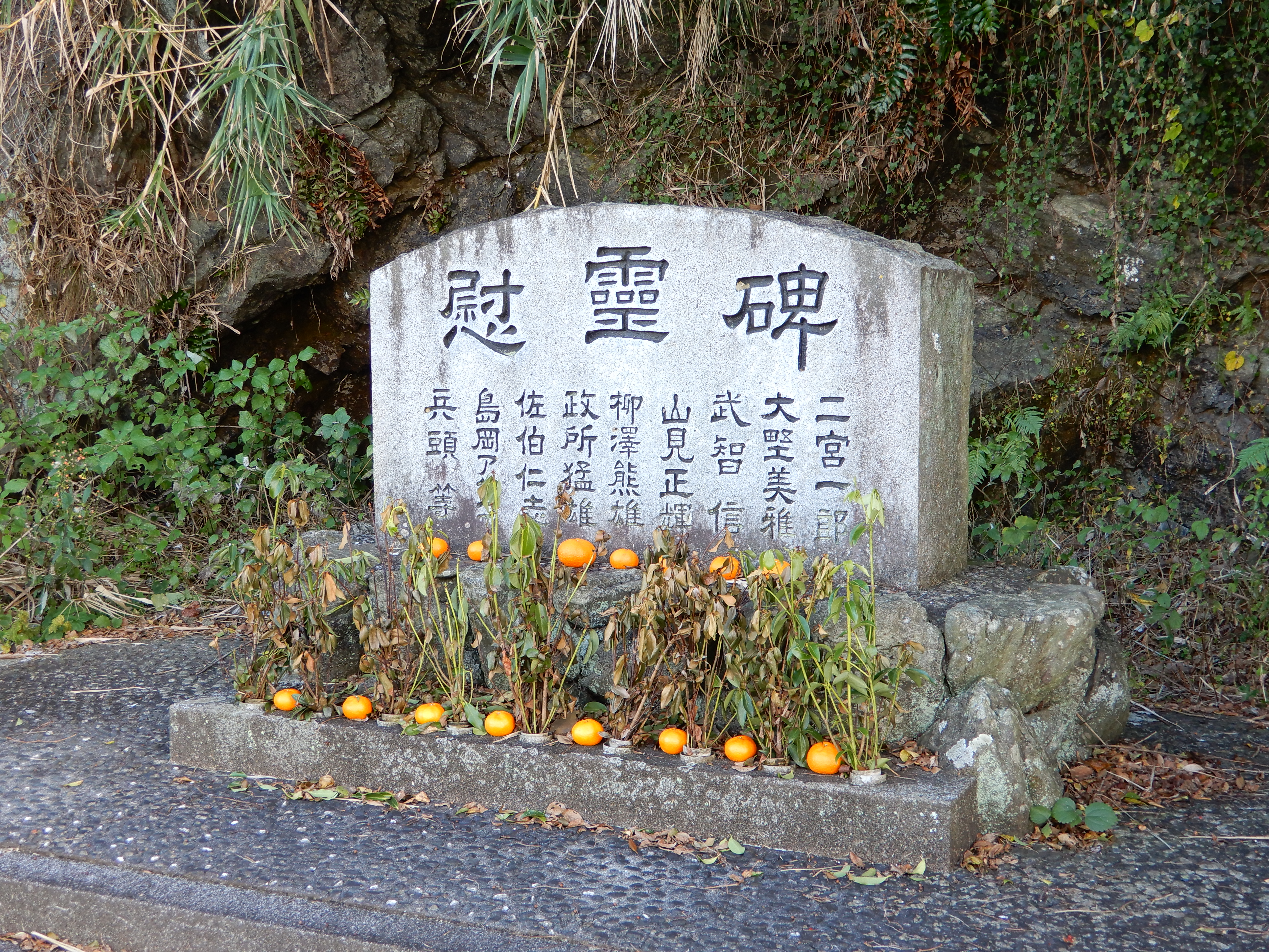 長浜町バス転落事故の慰霊碑 昭和31年3月に除幕